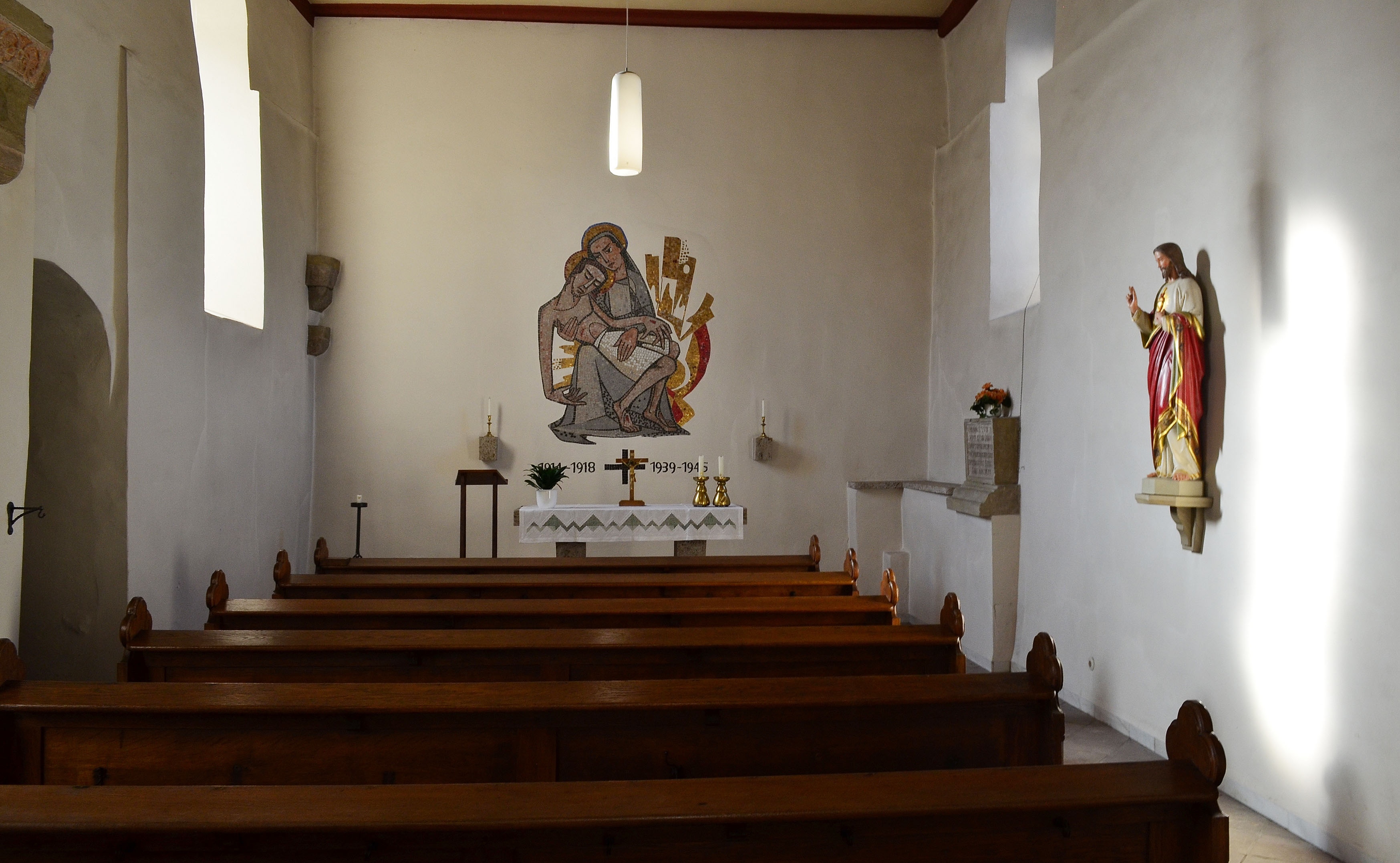 Brilon, Hoppecke, St. Mariä-Heimsuchung, alte Kirche, Blick auf den Altar und das Mosaik